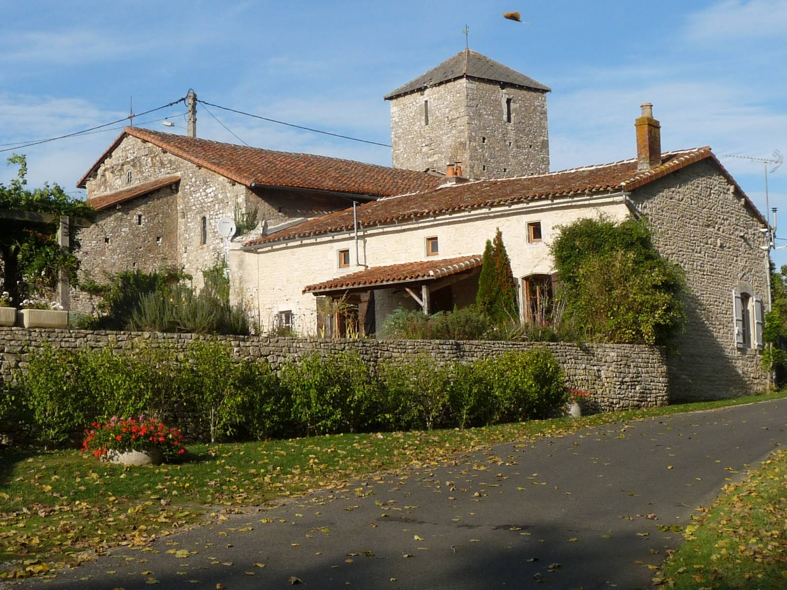 église de St-Gourson, Charente, France